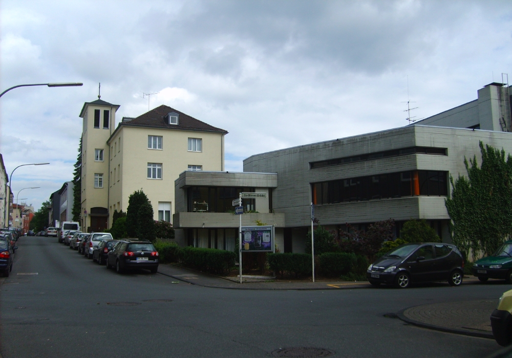 Christuskirche, Wuppertal-Barmen, Germany